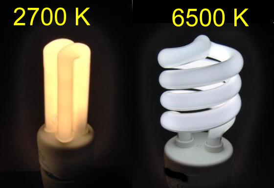 Energiesparlampen mit unterschiedlicher Farbtemperatur im Vergleich.